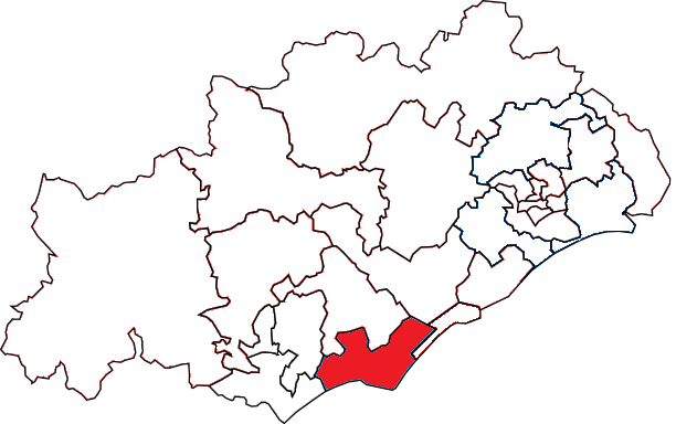 Situation du canton dans le département de l'Hérault